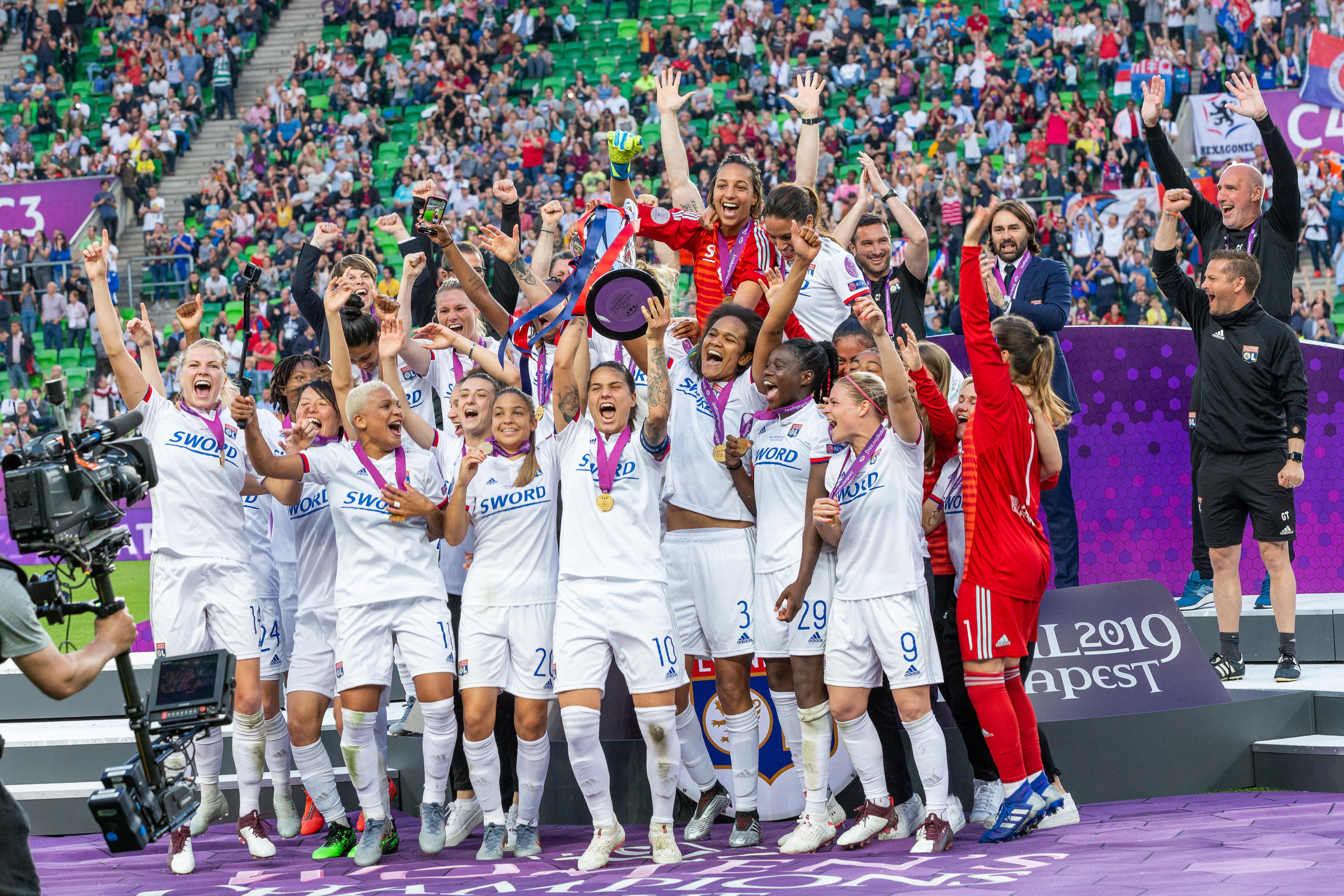 Fußball, Frauen, UEFA Women's Champions League, Olympique Lyonnais - FC Barcelona; Olympique Lyonnais feiert den erneuten Titel; Jubel, celebration